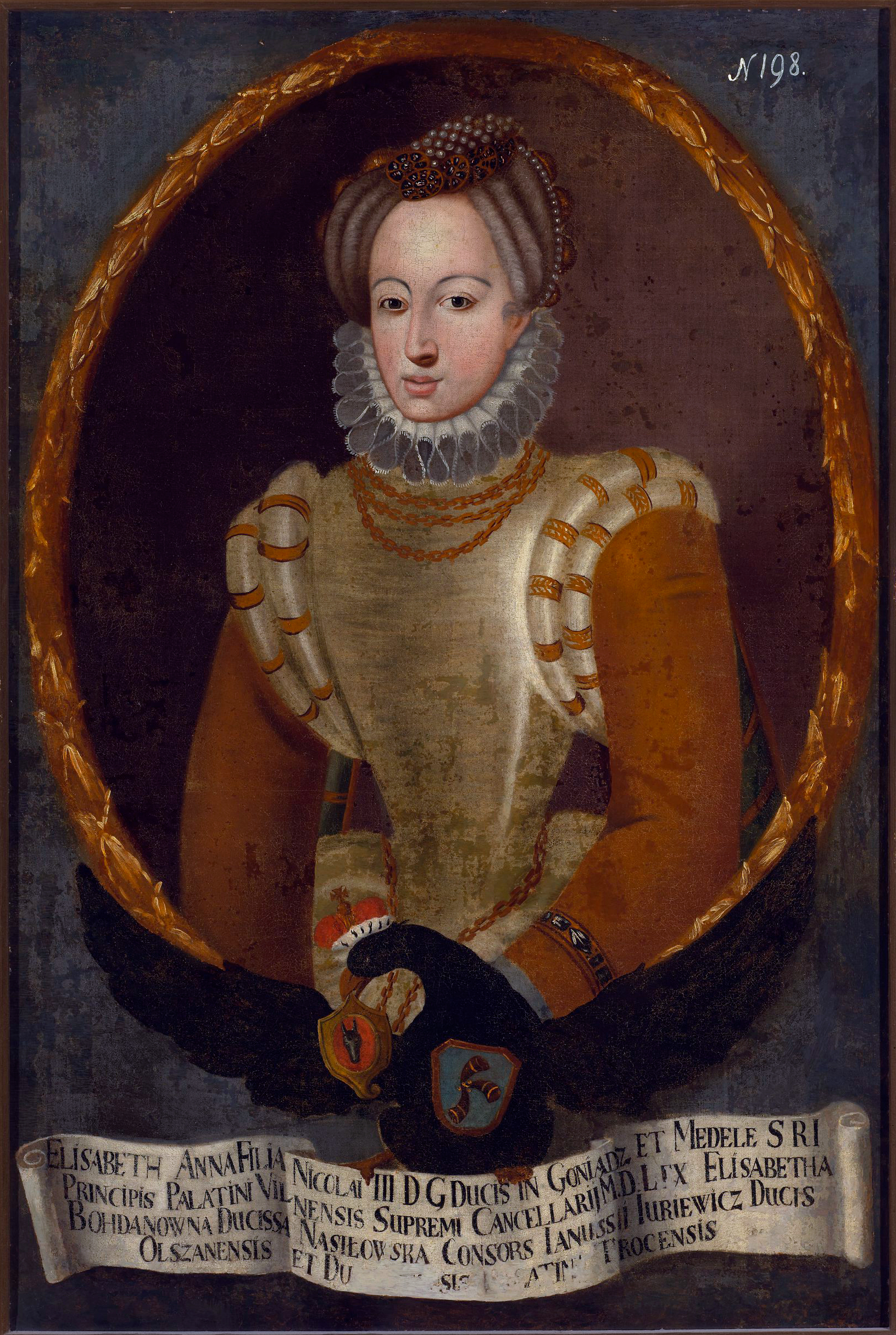 Беларуская (тарашкевіца): Партрэт Альжбеты Гальшанскай (Alžbieta Halšanskaja) з роду Радзівілаў (Radzivił)